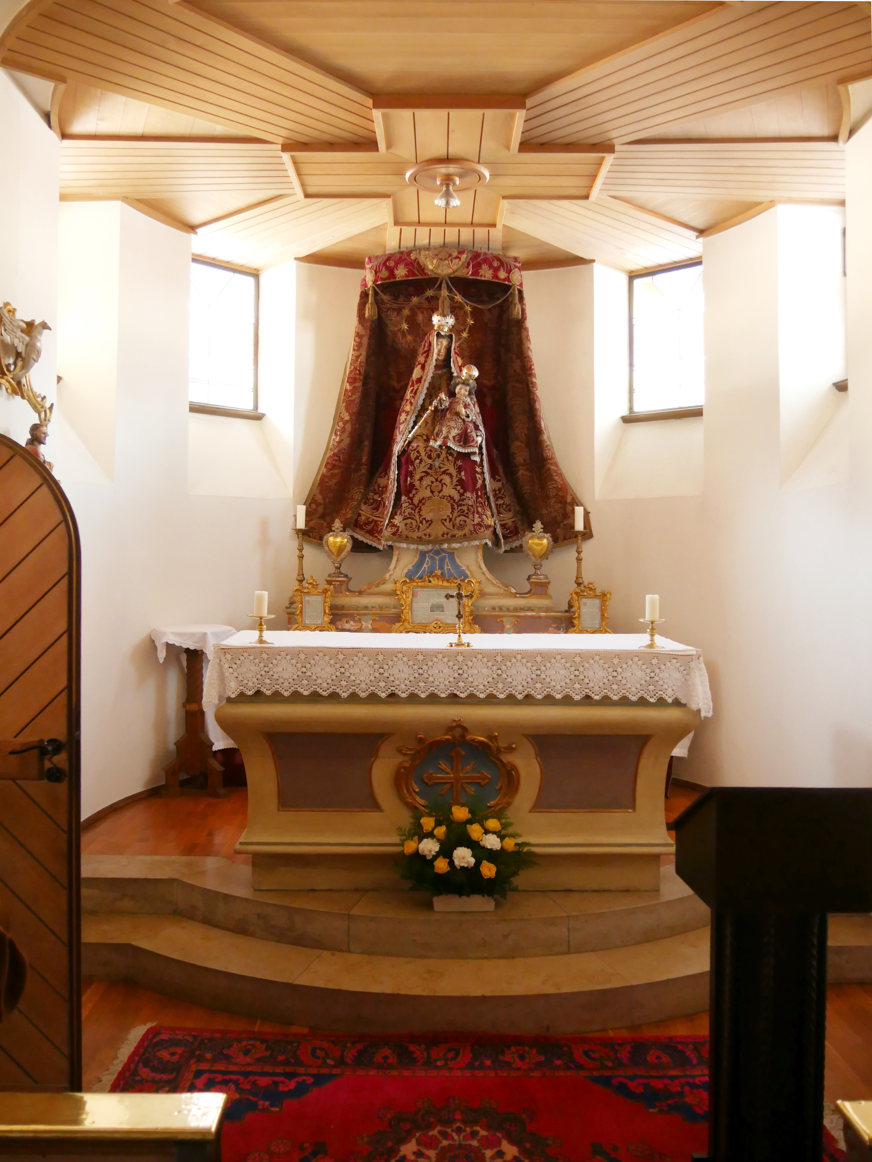 Kochel am See, Ortsteil Walchensee, Ringstr. 9: Katholische Pfarrkirche Sankt Ulrich. Seitenkapelle mit Marienaltar